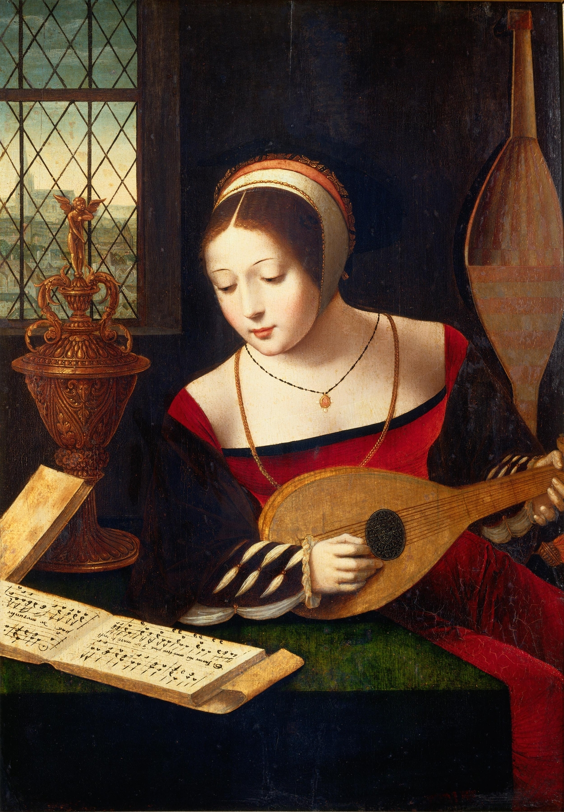 Eine vornehm gekleidete junge Frau spielt auf einer Laute. Sie trägt ein rotes, Kleid aus Samt und auf dem Kopf eine Haube, einen goldenen Ring am Finger ihrer rechten Hand und filigrane Kette mit einem aufwändig gearbeiteten, mit Perlen und Rubinen besetzten Anhänger. Die Dame blickt auf ein aufgeschlagenes Liedheft auf dem Tisch vor ihr. Das kostbare Gefäßes in der Nische links wird sowohl als Salbgefäß der Maria Magdalena gedeutet als auch als rein dekoratives Element im Bild.